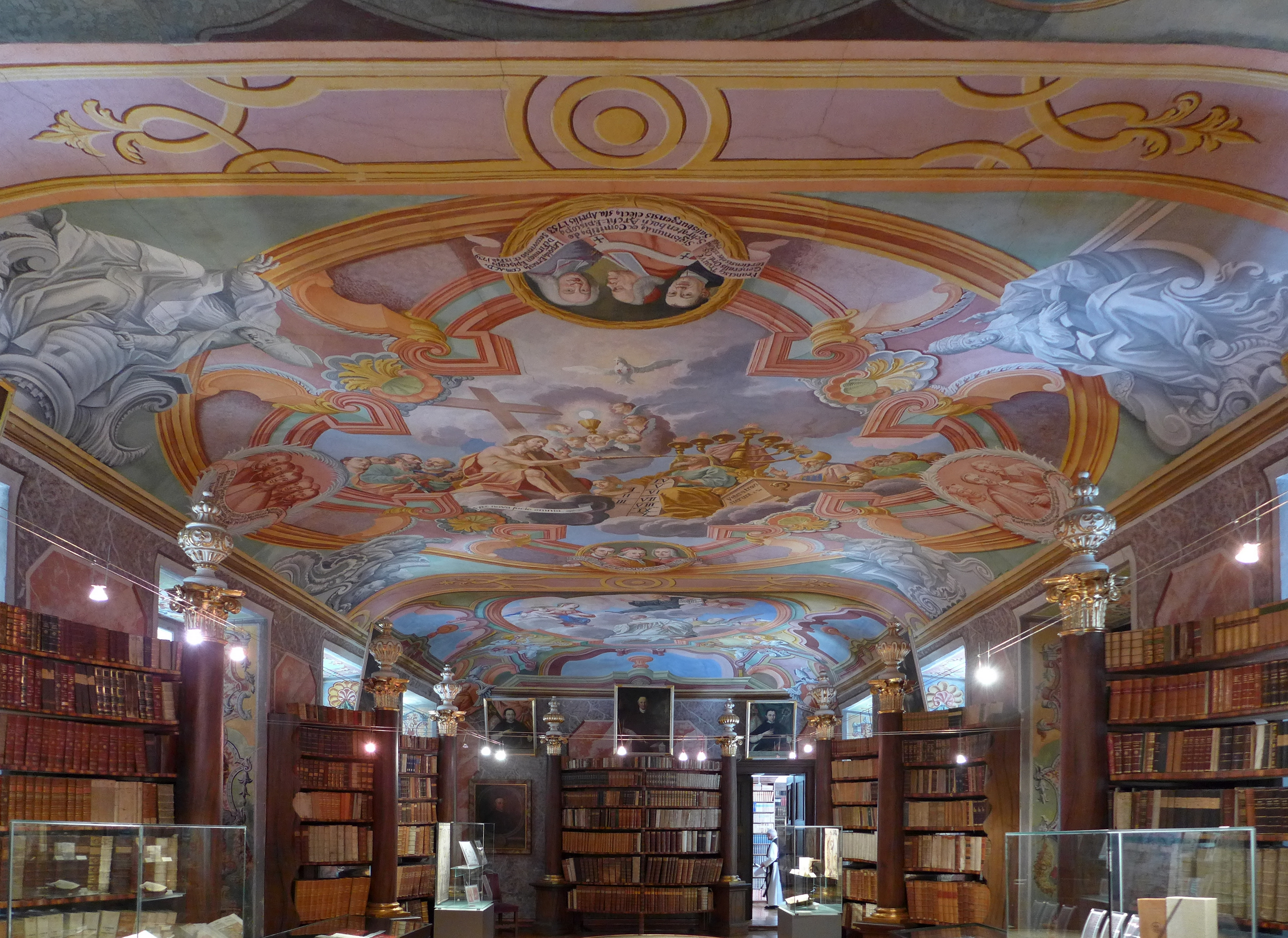 Stift Rein - Bibliothek 2